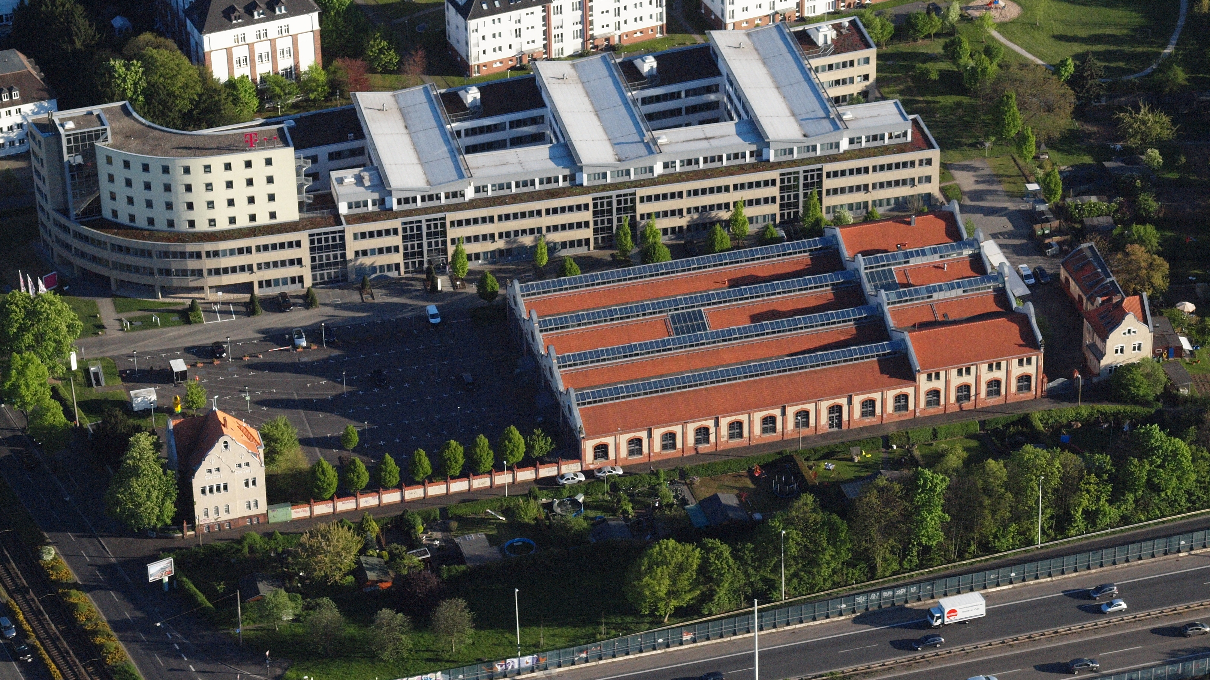 Ehemalige Wagenhalle und Direktorenvilla, Graurheindorfer Straße, Bonn-Castell: Luftaufnahme